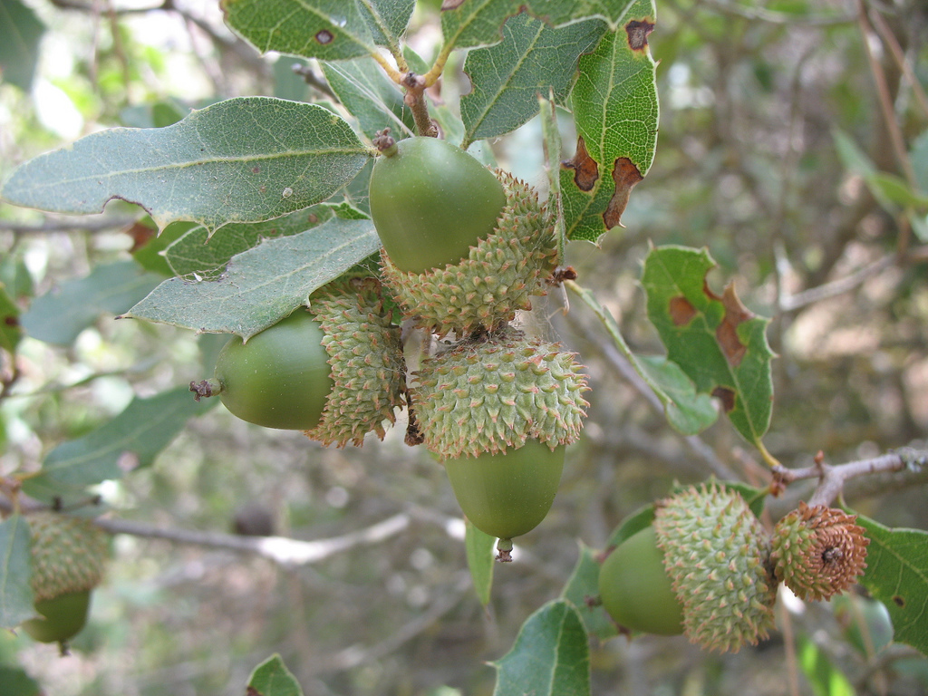 Quercus coccifera acorns. Spain.